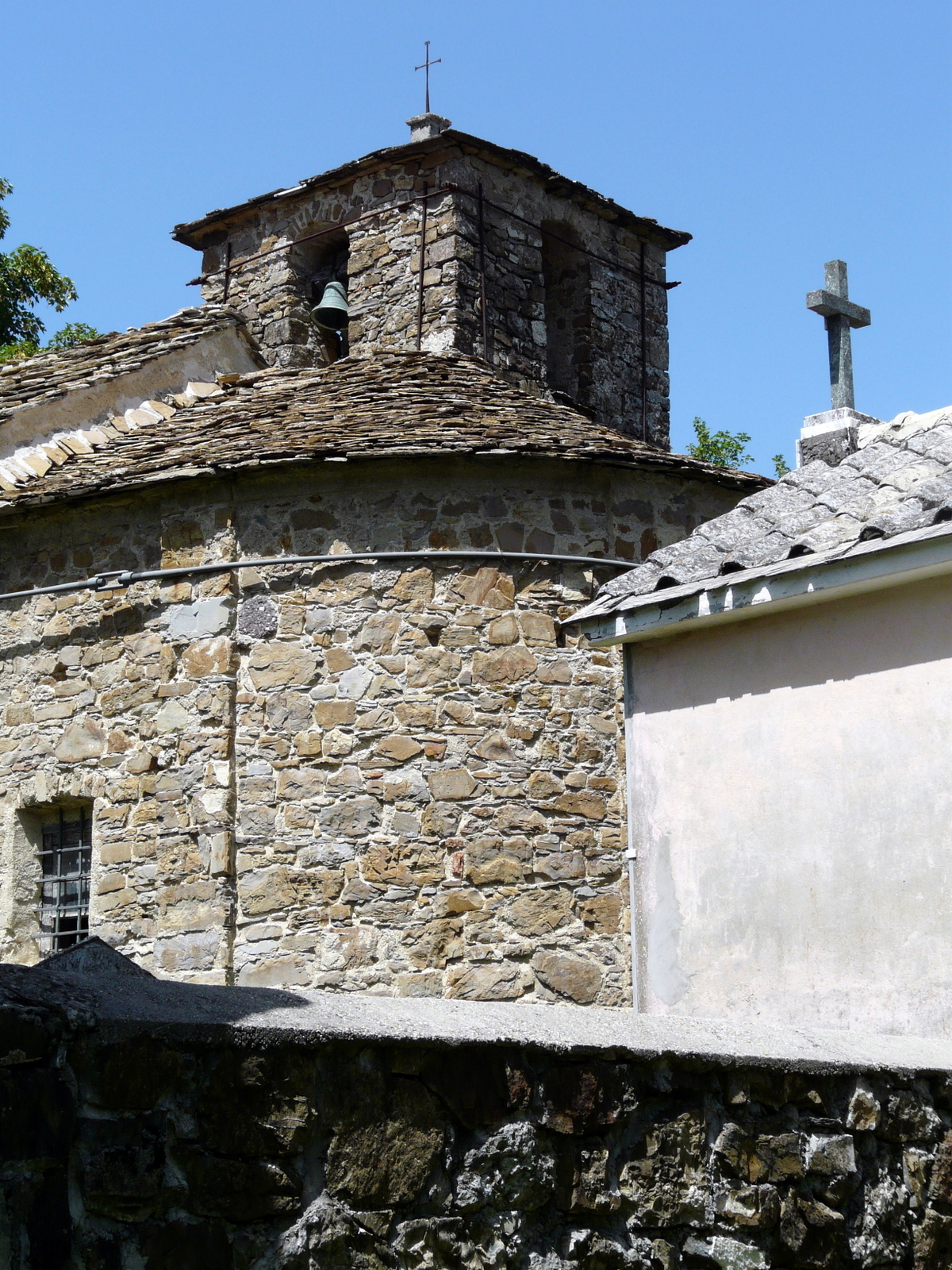 La chiesa di Santo Stefano, Fontanarossa, Gorreto, Liguria, Italia